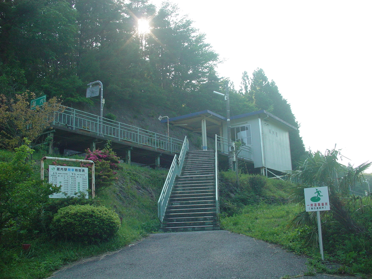 （蔵内駅）